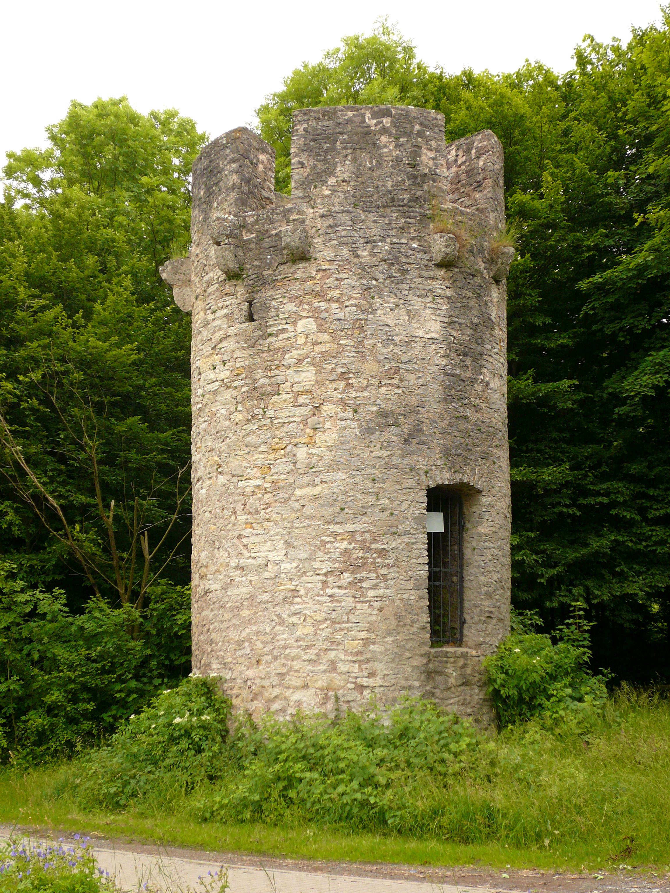 Ruine der Berwinkelswarte oder Roringer Warte 1 km ostnordöstlich von Roringen, Stadt Göttingen, Niedersachsen. Erbaut 1407 als Teil der Göttinger Landwehrlinie zur Kontrolle der Straße Richtung Duderstadt und Harz